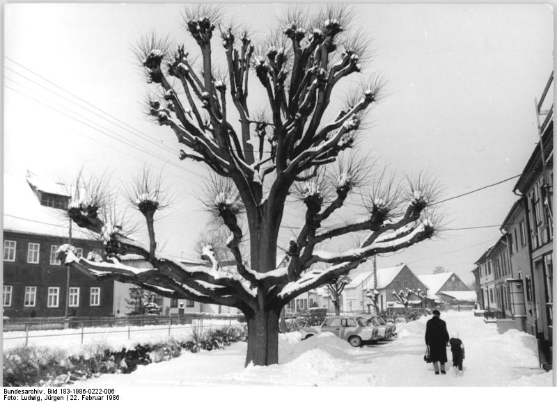 Tabarz, Dorflinde, Winter ADN-ZB Ludwig-22.2.86 Bez. Erfurt: Winter- Auch ohen Blätter, von Schnee bedeckt, sieht die alte Dorfline in der Rainhardsbrunner Straße von Tabarz interessant aus. Das Naturdenkmal ist rund 180 Jahre als. Es ist eine der wenigen in Thüringen noch erhaltenen "Tanzlinden", auf denen früher die Musikanten Platz nahmen und zum Dorftanz aufspielten. Der untere Astkranz wurde speziell zu diesem Zweck durch Schnitt beeinflußt, daß man Bretter zum Sitzen über die Äste legen konnte. Im Raum Tabarz gibt es rund 30 Naturdenkmale, viele davon sind Bäume.